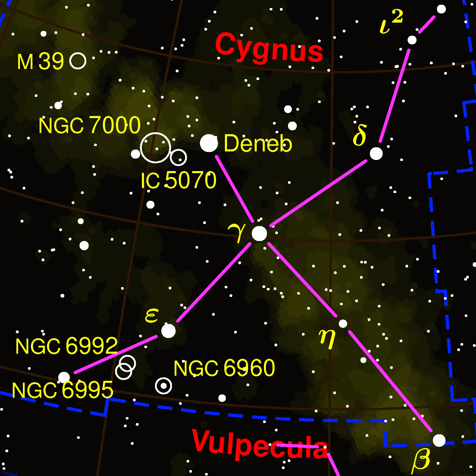 Cygnus constellation